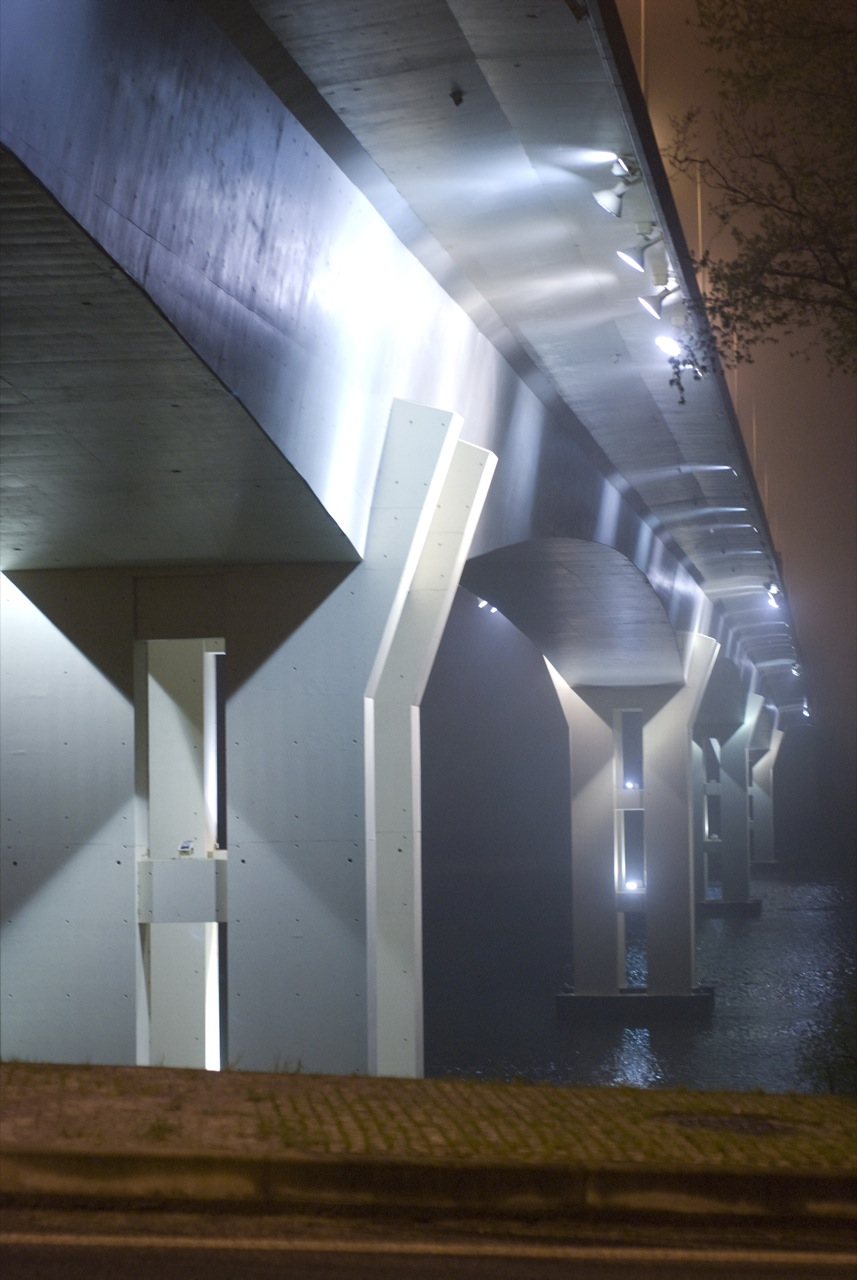 Ponte Internacional Vila Nova de Cerveira. 8 D